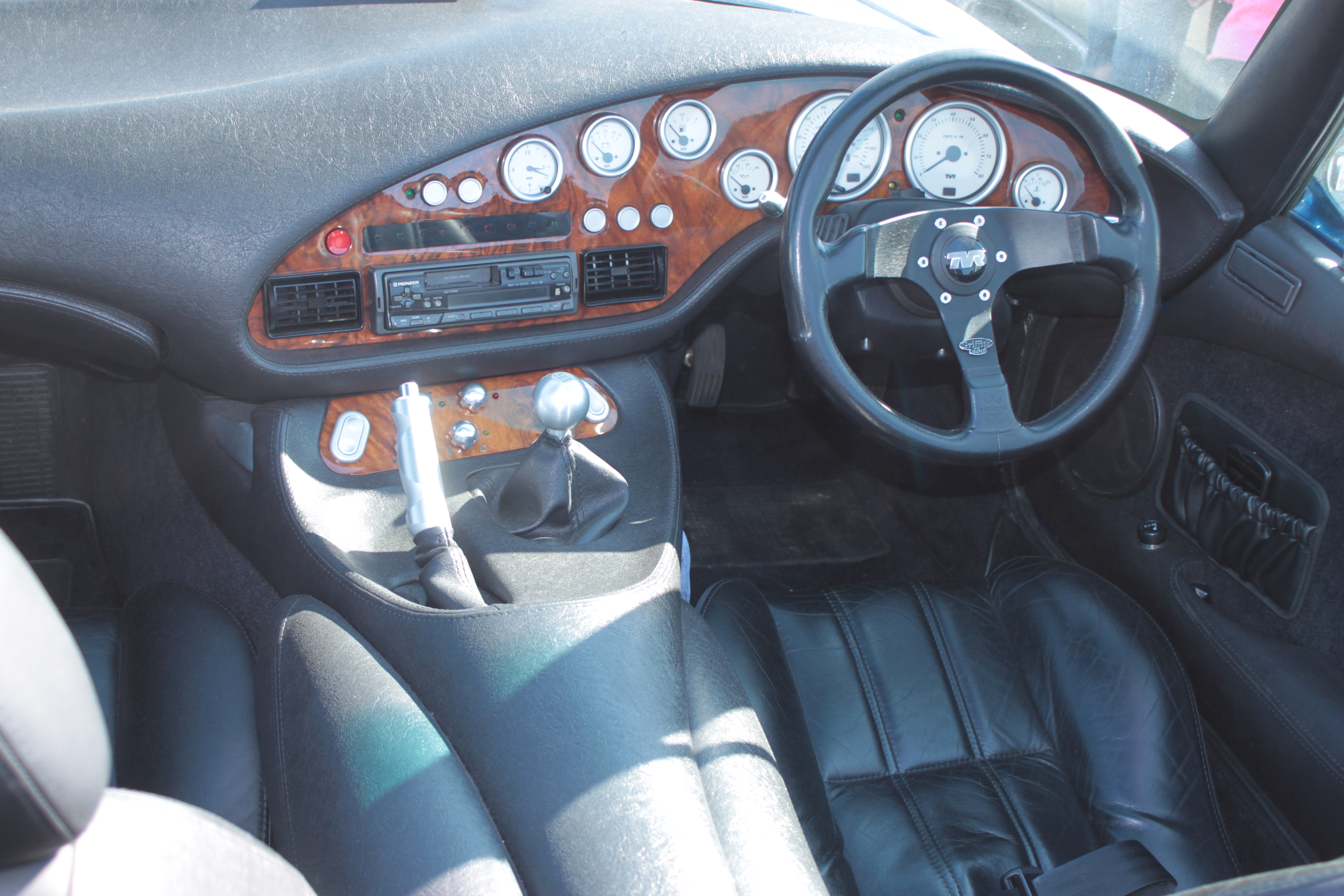 Tableau de bord de TVR Griffith 500 V8, 5L, 340hp.